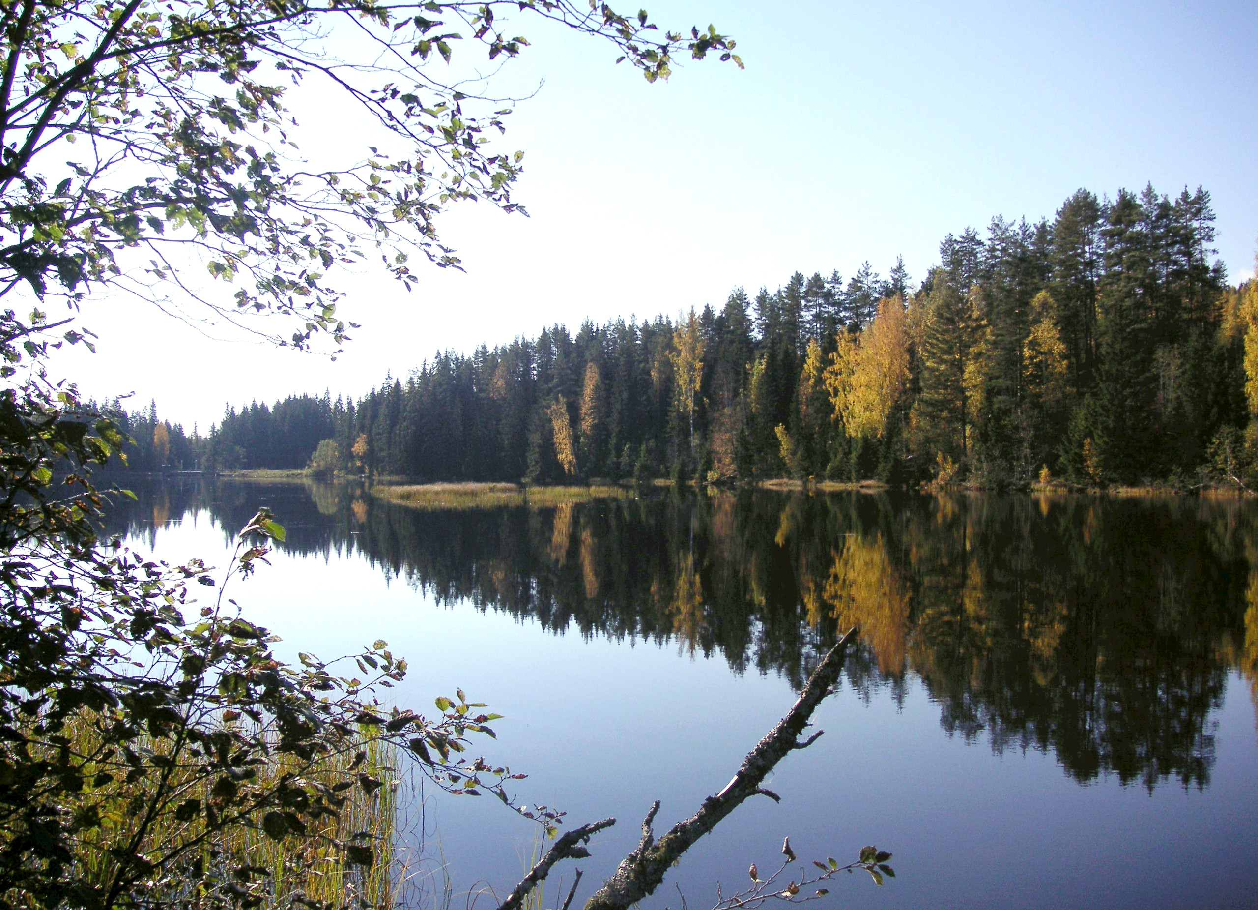 Stenbergstjärnen (Nydammen) vy mot syd